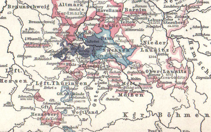 Die Grafschaft Orlamünde im Herrschaftsbereich der Askanier (Grenzen unsicher). Alfred Baldamus und Ernst Schwabe: F.W.Putzgers Historischer Schul-Atlas zur alten, mittleren und neuen Geschichte, 31. Auflage, Verlag von Velhagen & Klasing, Bielefeld und Leipzig 1907